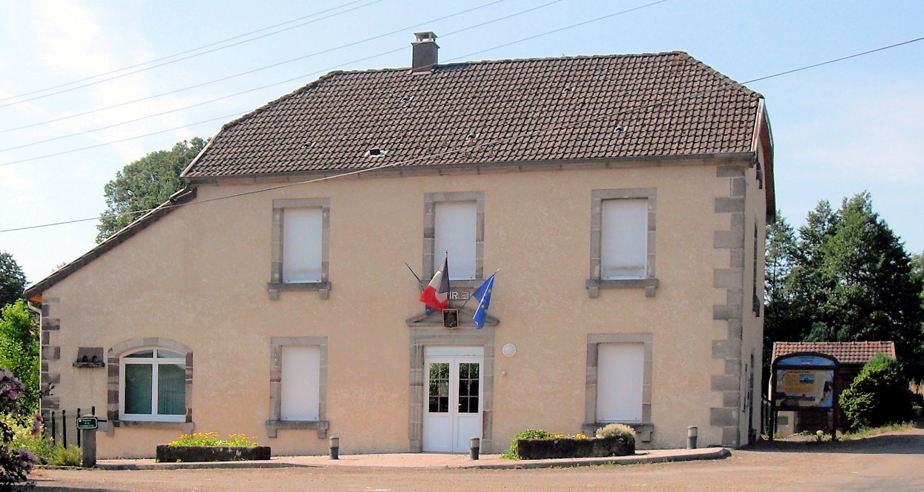 La mairie des Fessey